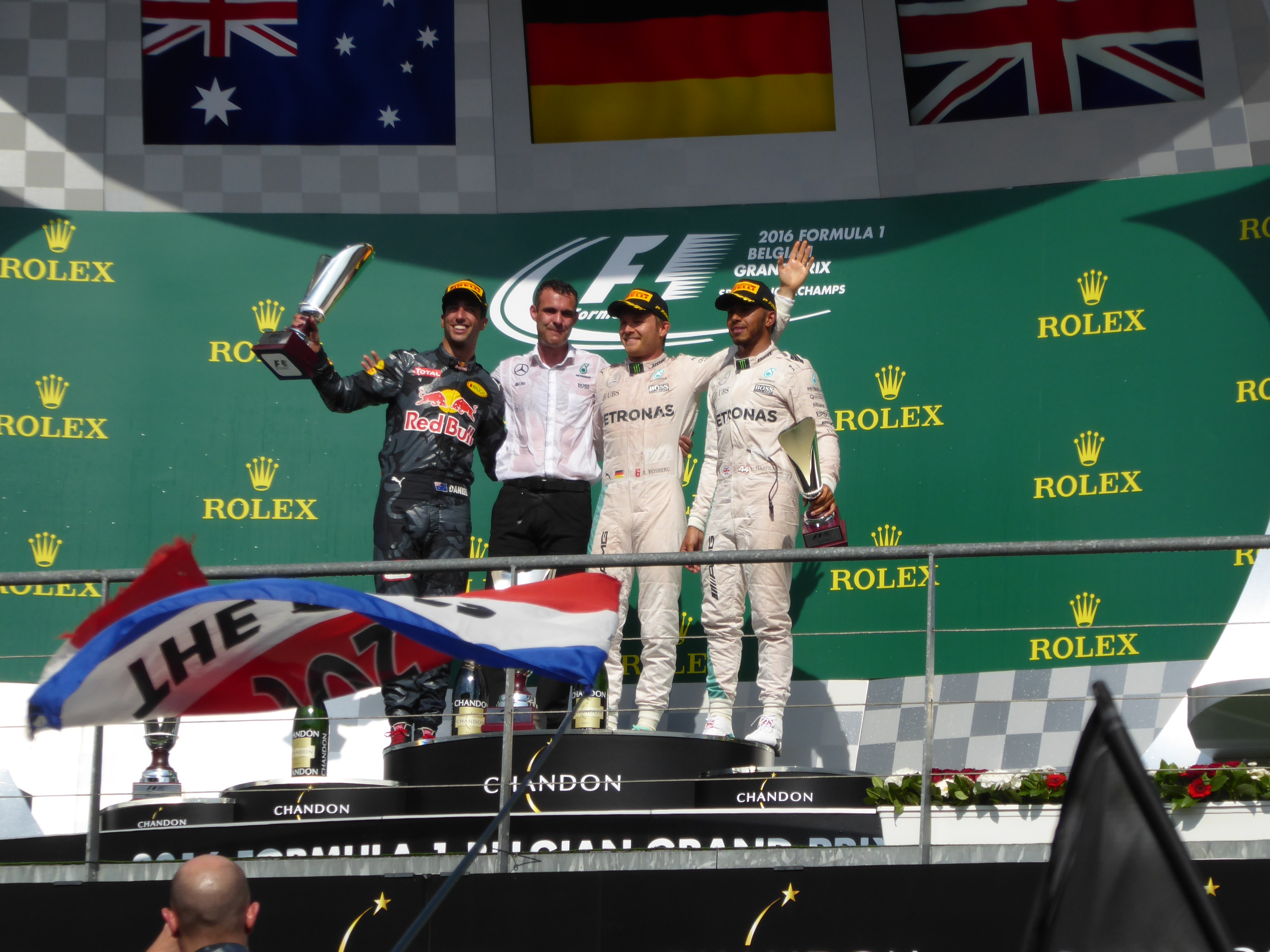 Podium du Grand Prix automobile de Belgique 2016 après la cérémonie du champagne. Nico Rosberg (P1), Daniel Ricciardo (P2), Lewis Hamilton (P3).